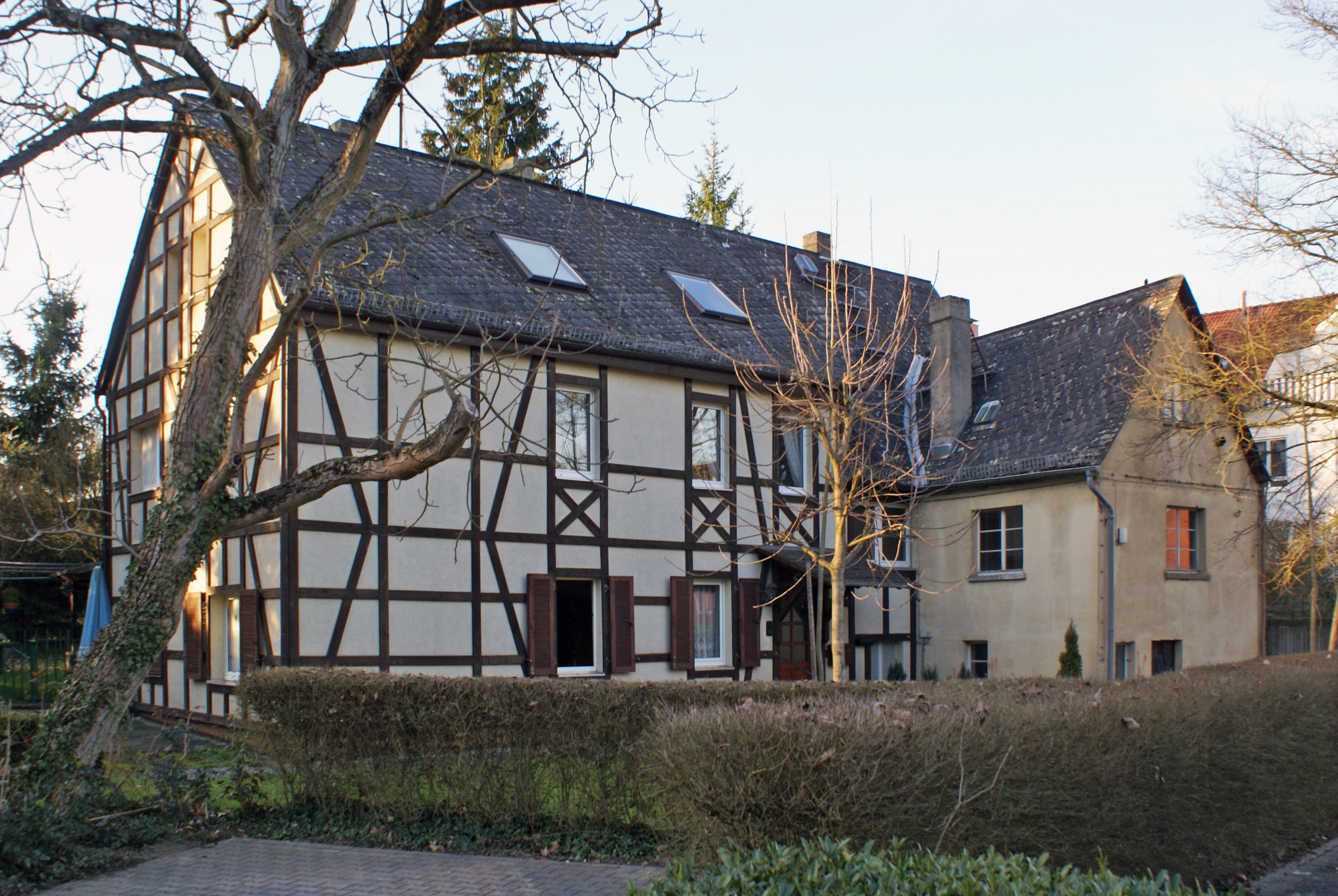 Kircher-Mühle in Niederwalluf